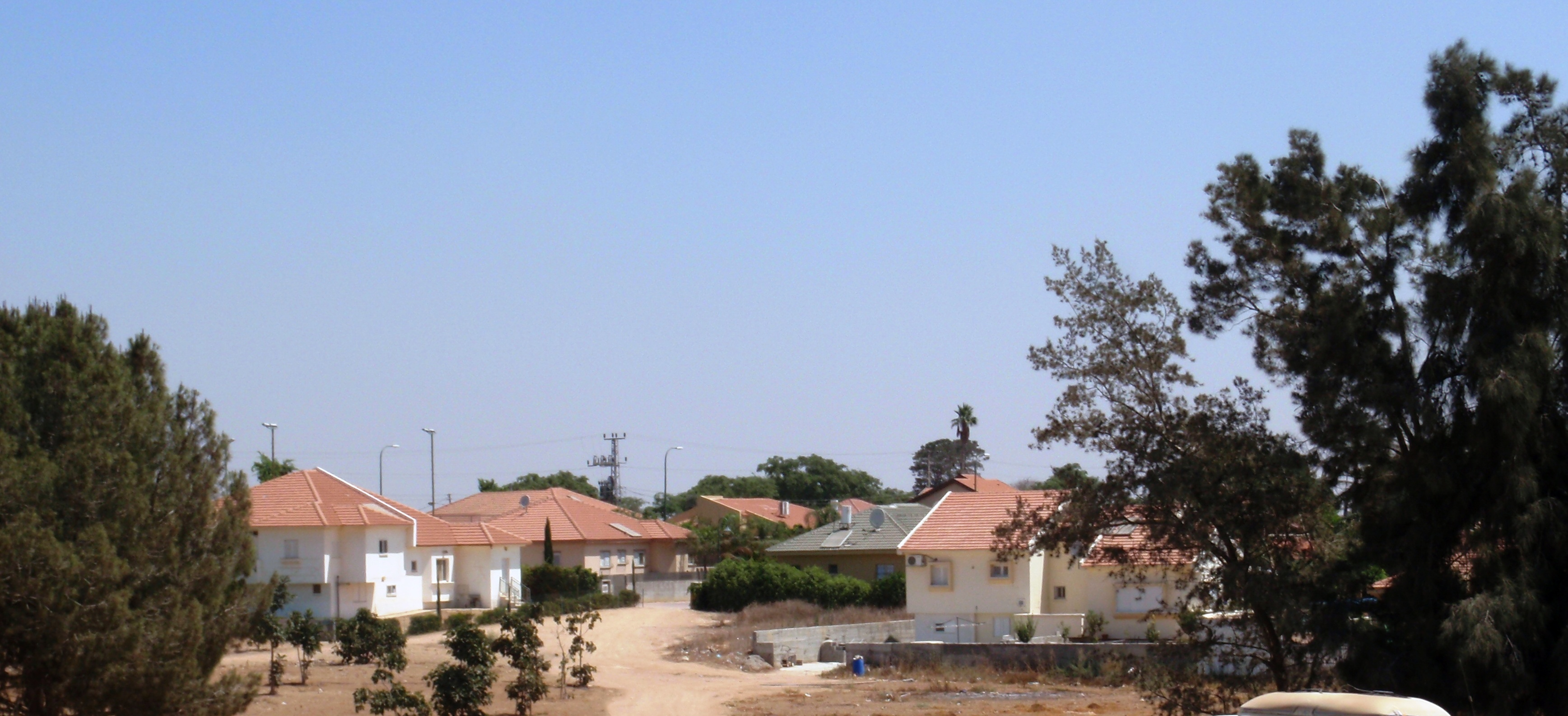 Moshavim בית הגדי ליד המגרש